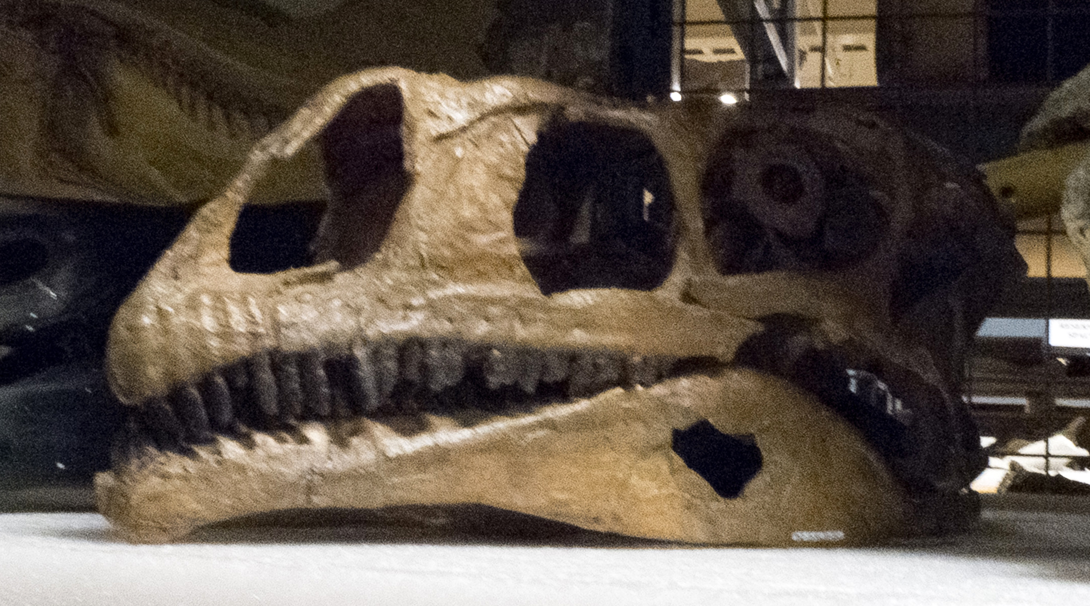 barb-x10-royal-tyrrell-familycamp-20120803-59.jpg